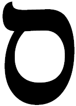 Hebrew letter Samekh